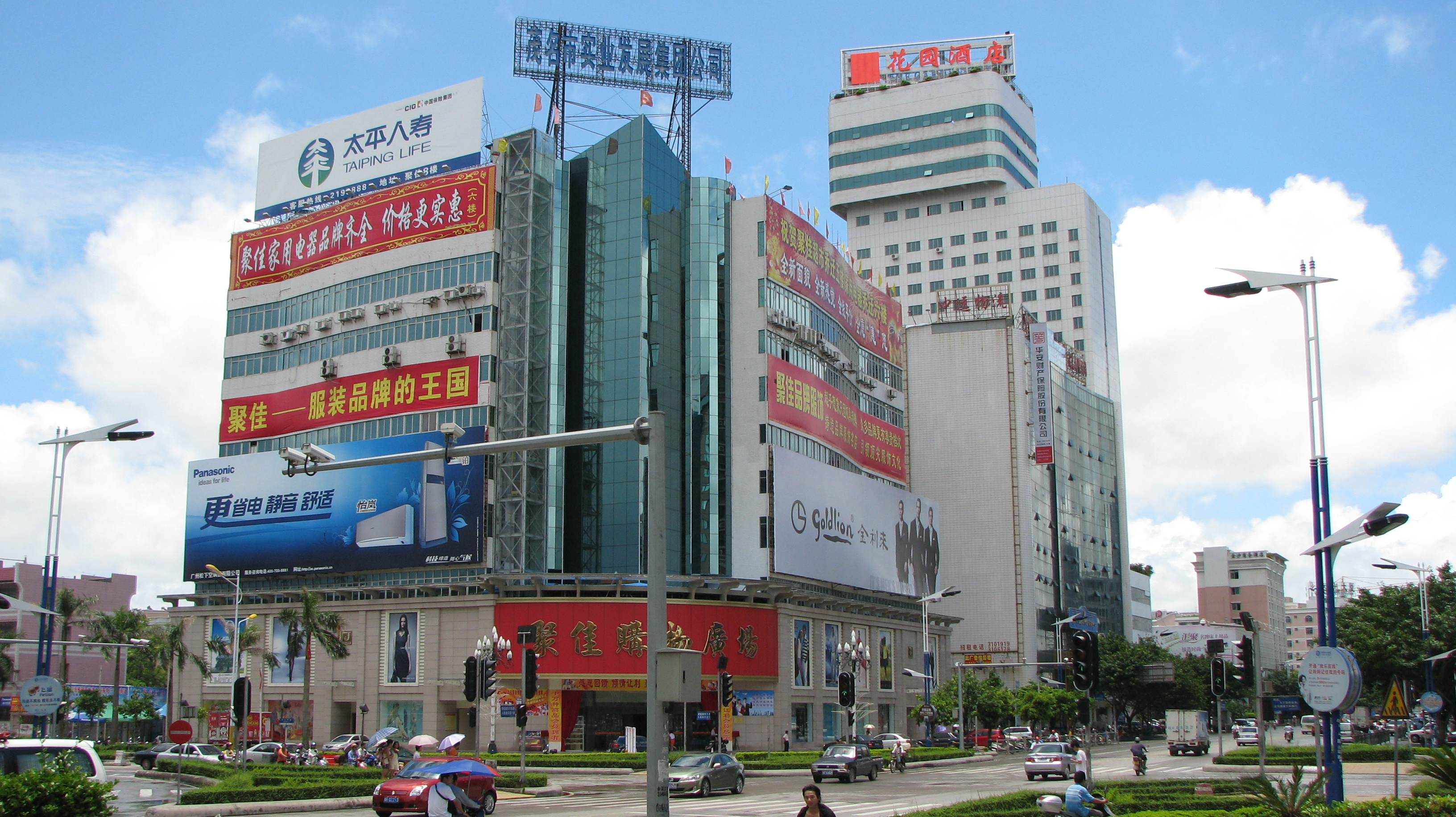 Maoming, 2009